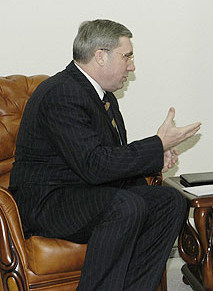 Viktor Tolokonsky, governor of Novosibirsk Oblast